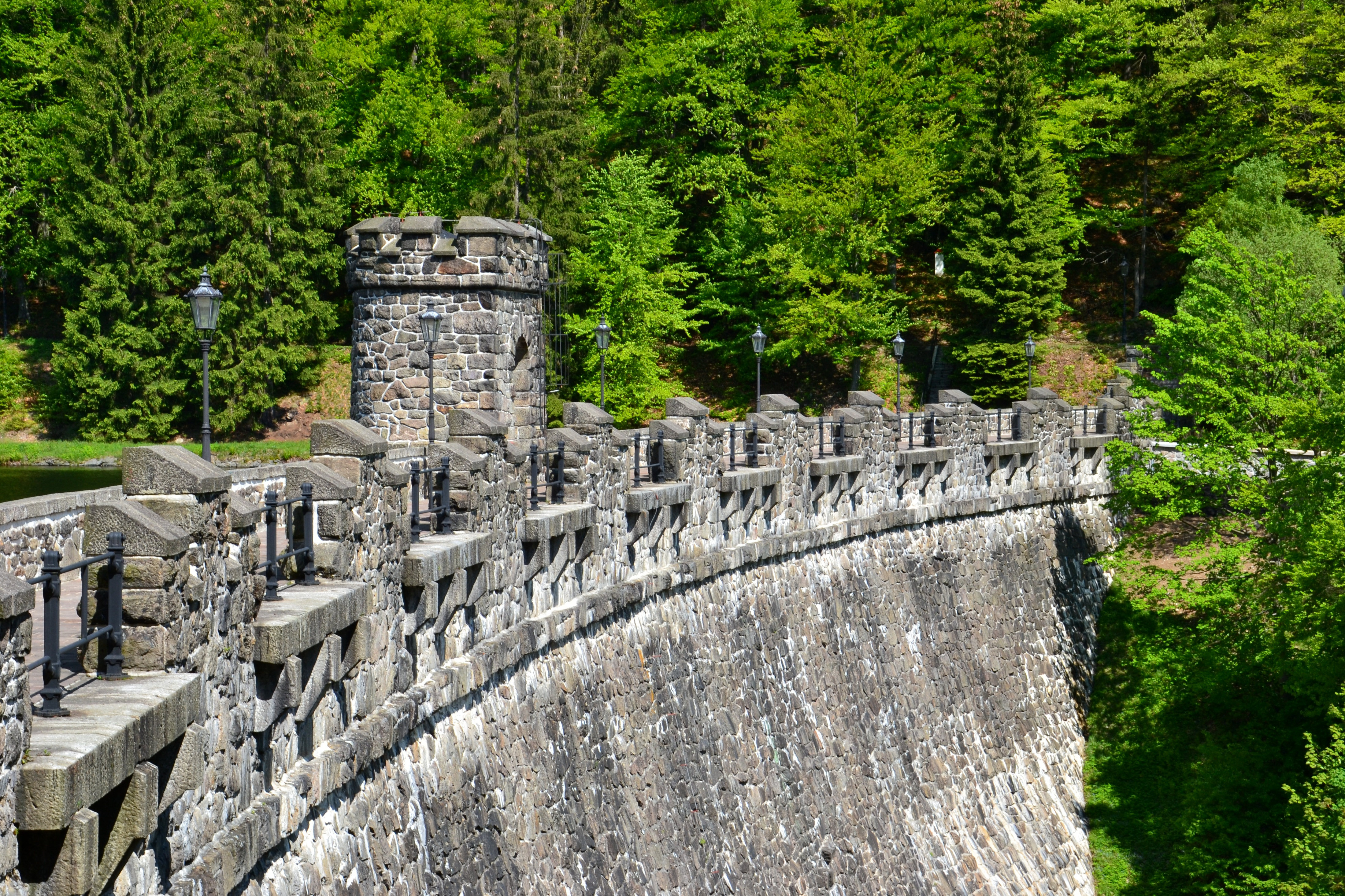 Přírodní park Bezručovo údolí - vodní nádrž